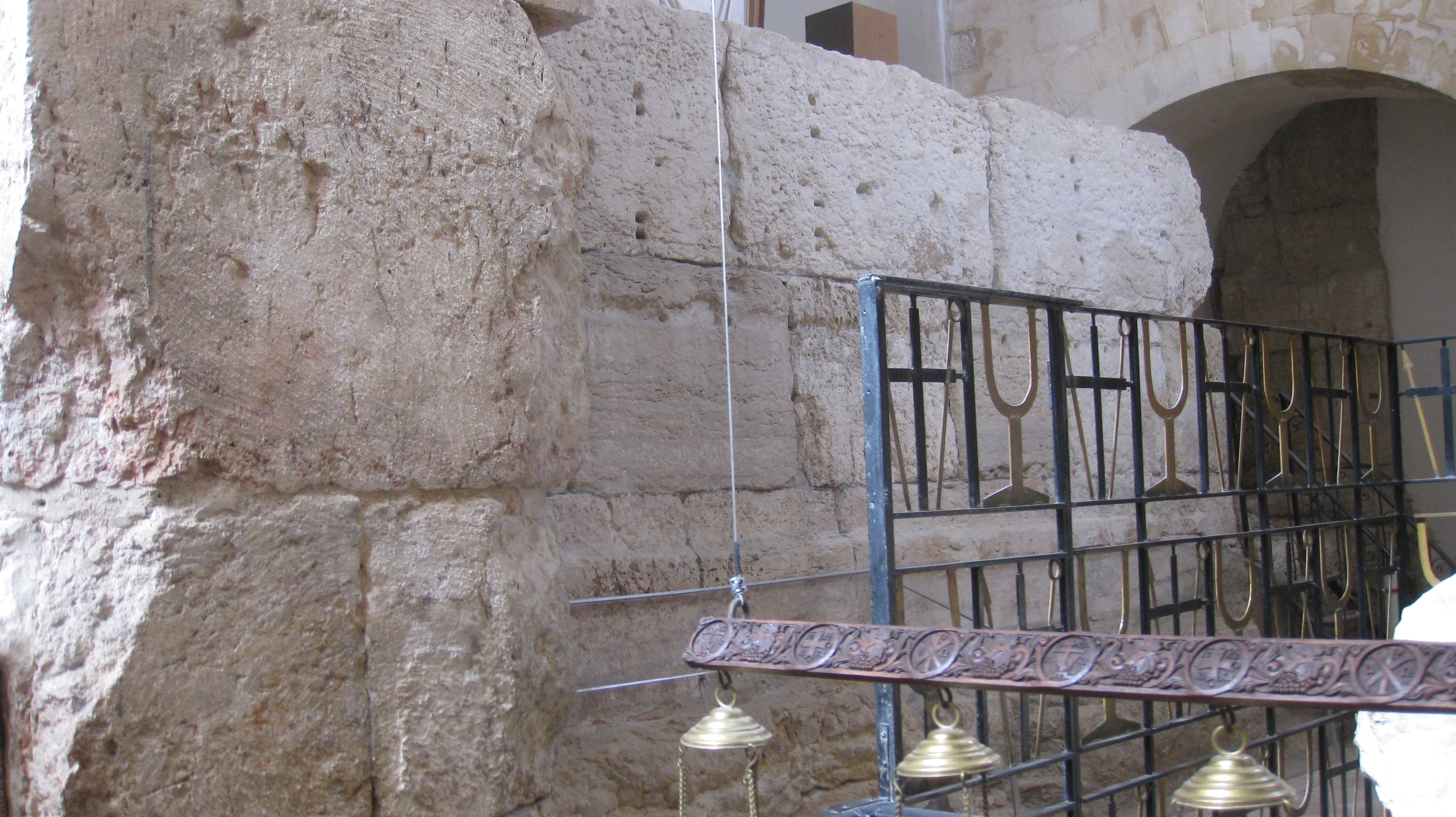 The Christian Quarter - The Russion Church הרובע הנוצרי בעיר העתיקה של ירושלים הכנסייה הרוסית